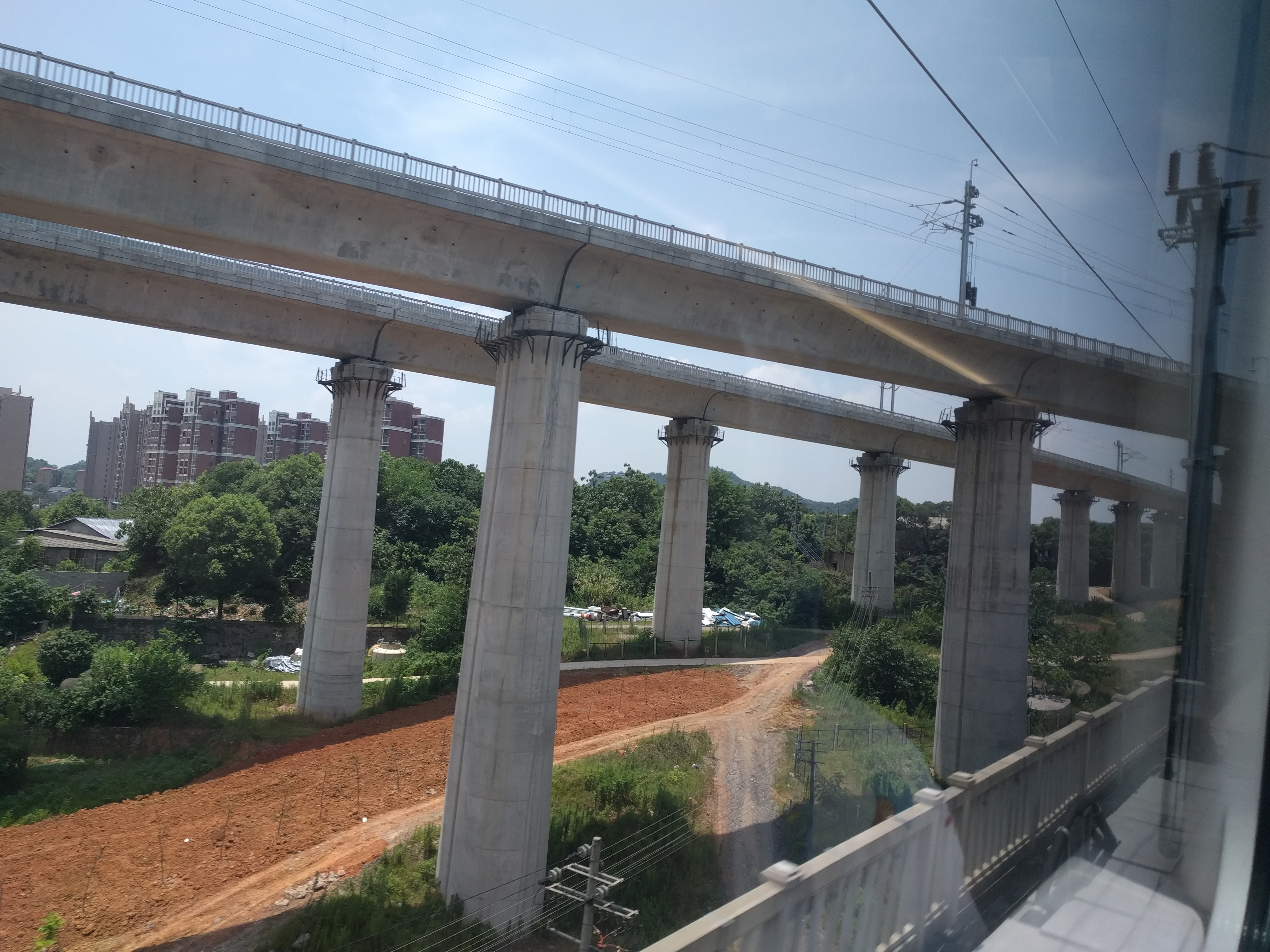 暮云站南端两条线路合并